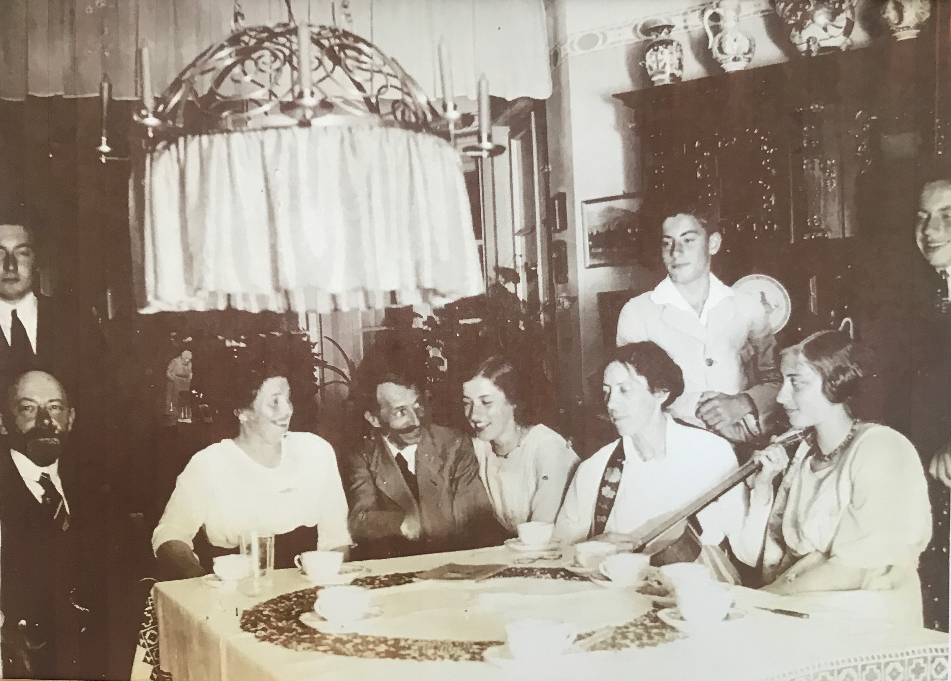 Feestje in huize FSH rond 1920